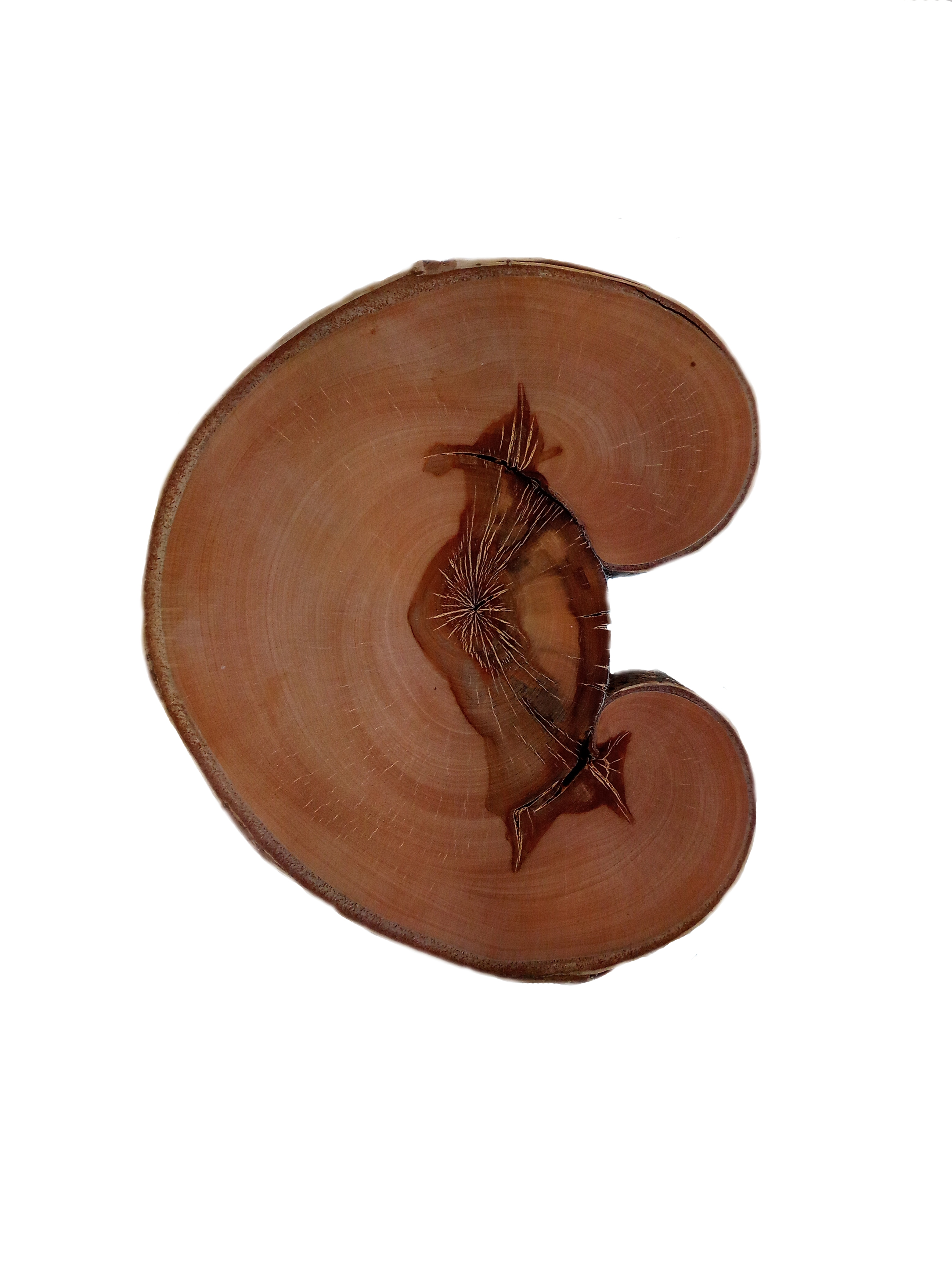 Deutliche Überwallungswülste nach vieljährigem Verbleib in Phase 3 des CODIT-Prinzips.